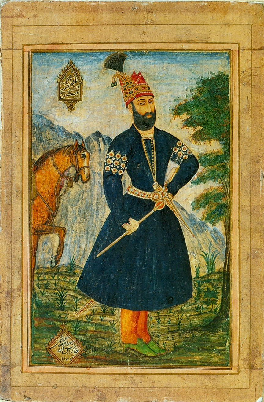 Bahram._Nadir_Shah_1743-4_Эрмитаж